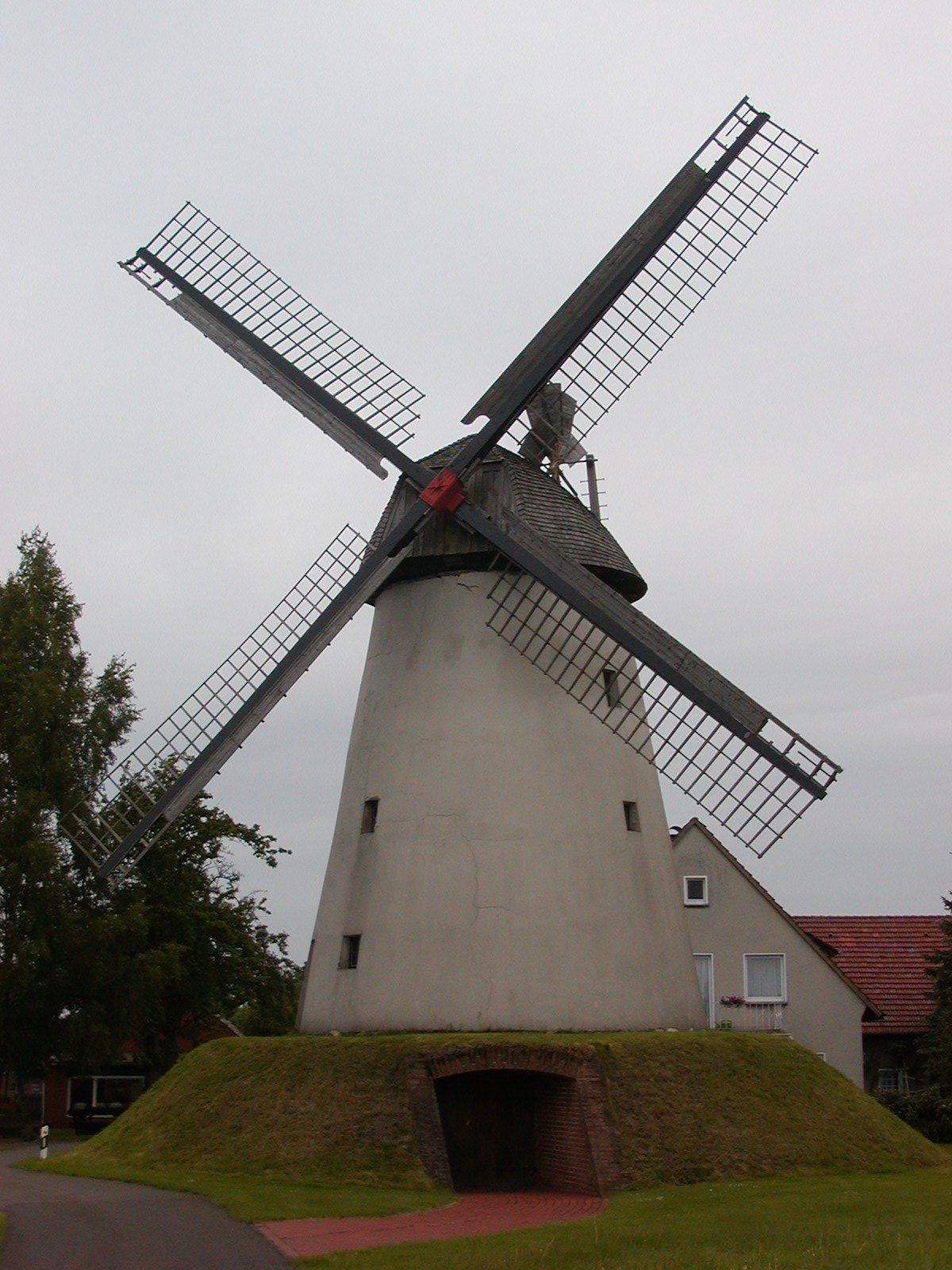 Mühle Wegholm Sonstiges: ...